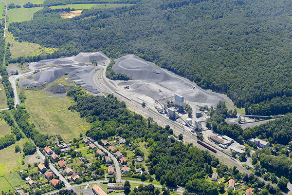 Uzsa község és a bánya látképe